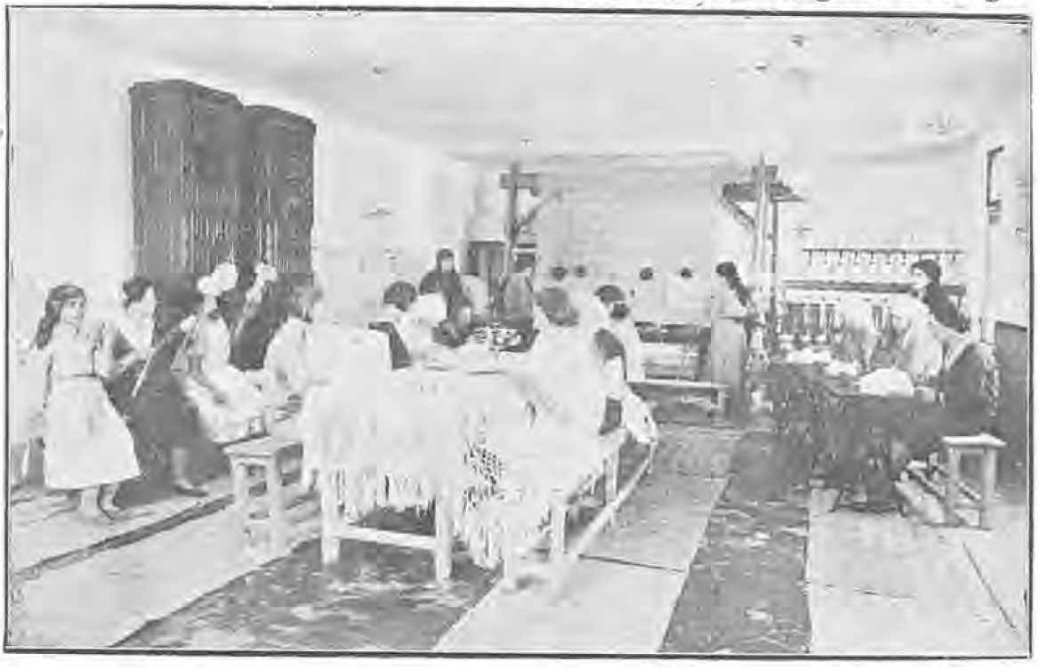 Imagine a atelierului de produse textile din Mănăstirea Plătăreşti, România.